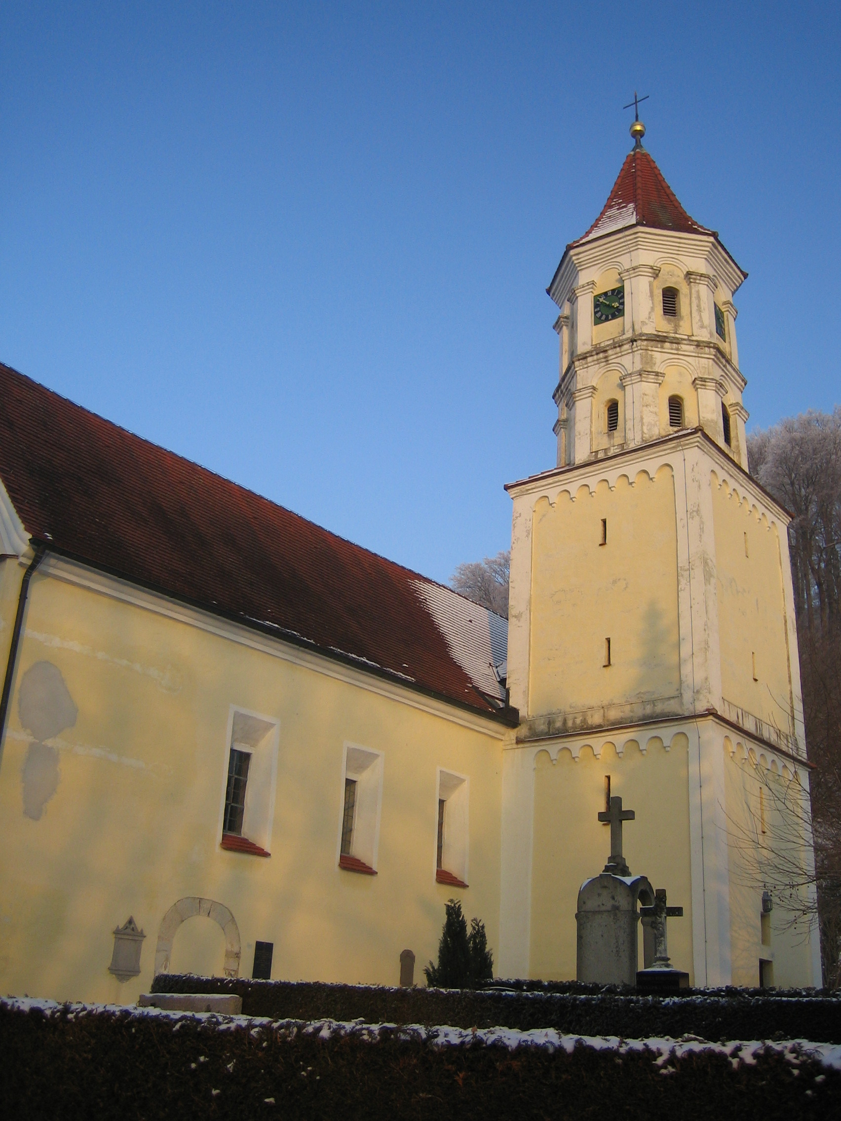 Marienkirche Altenstadt Iller, Bavaria, Germany